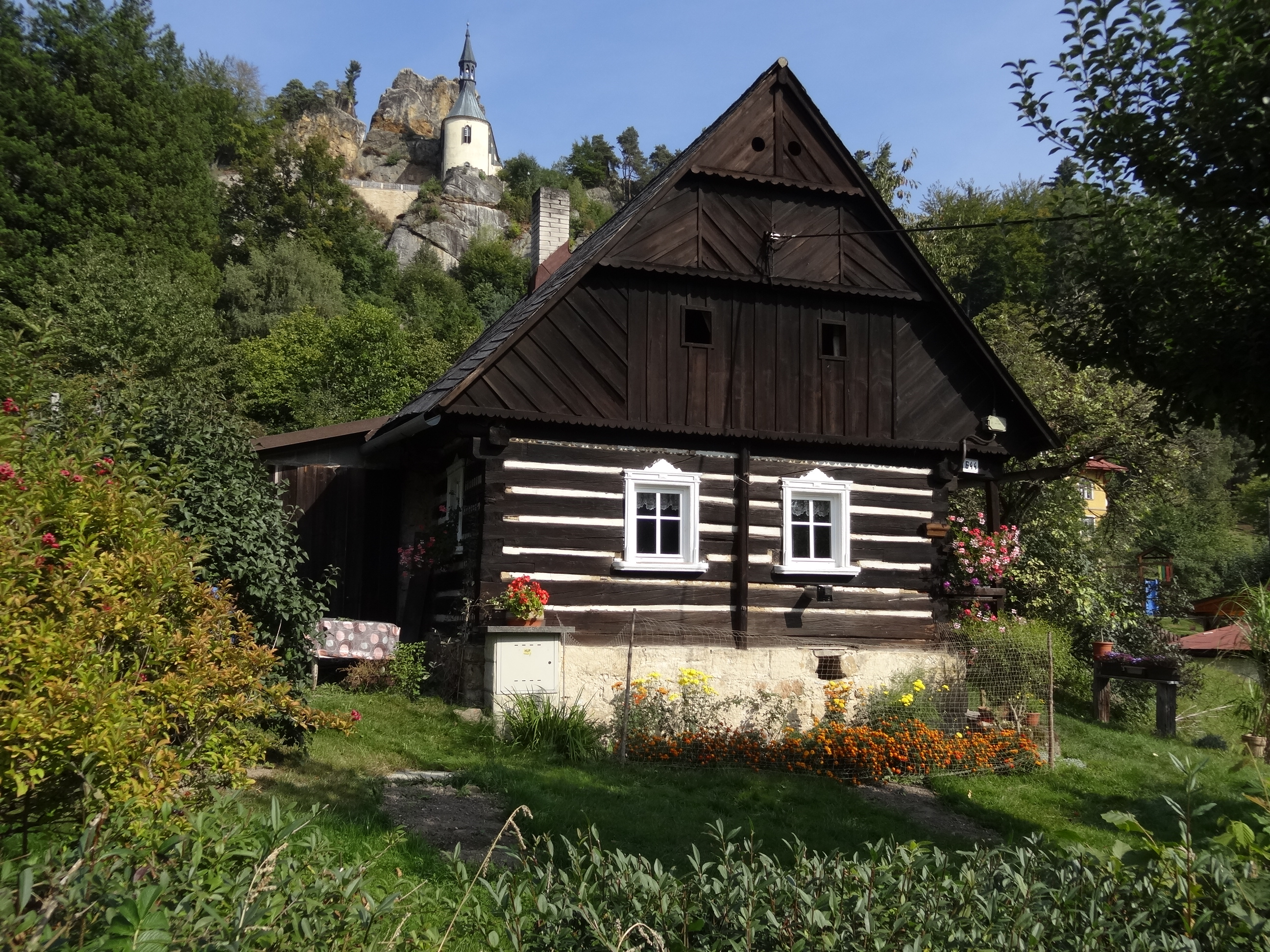 Vranové 2.díl - če. 644, v pozadí Vranov (Pantheon)